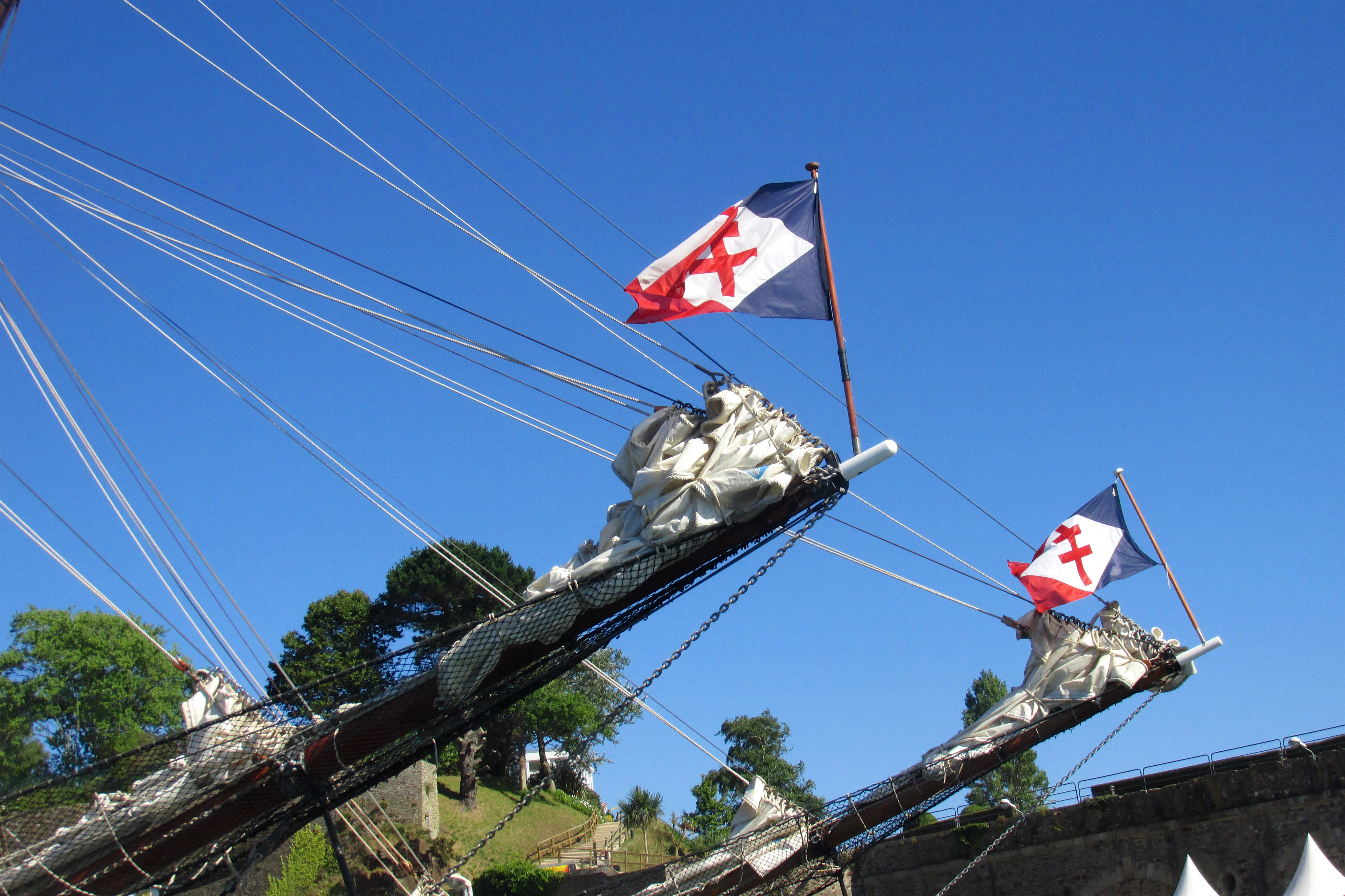 Elles ont participé à la Seconde Guerre mondiale dans les Forces navales françaises libres et les 2 goélettes arborent légitimement le pavillon de beaupré à la croix de Lorraine des FNFL.